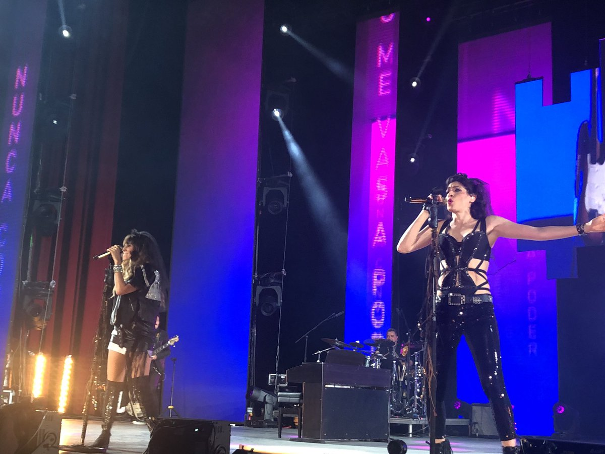 Ha*Ash Auditorio Nacional México 11 de Noviembre de 2018